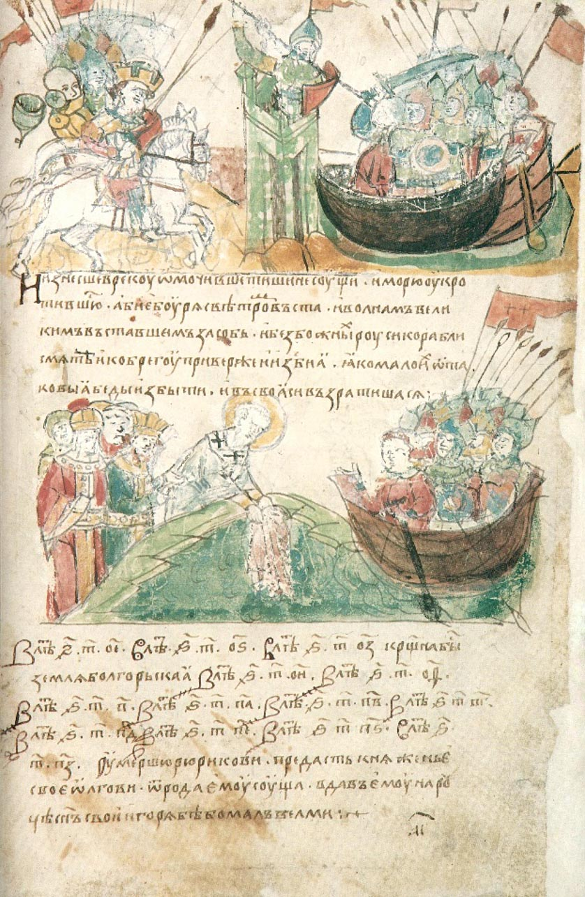 Radzivill chronicle. List 10, front. Изображен поход Аскольда и Дира 860 года на Царьград. (Image of Askold and Dira in 860 in Tsargrad)